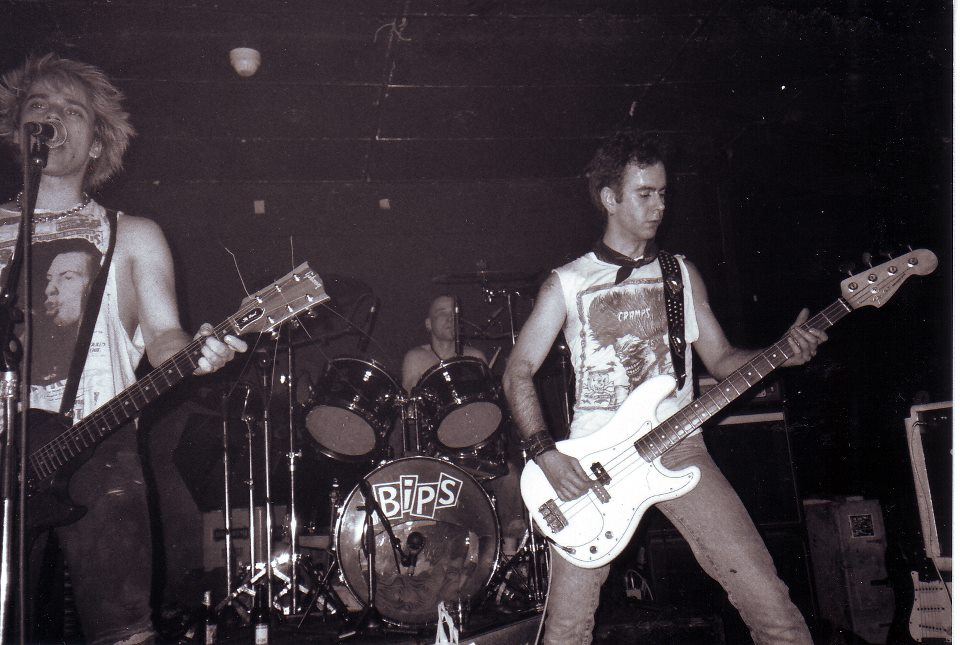 The Bips on stage